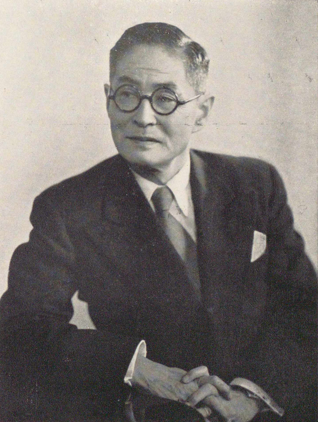 Portrait of Tanaka Kotaro (田中耕太郎, 1890 – 1974)